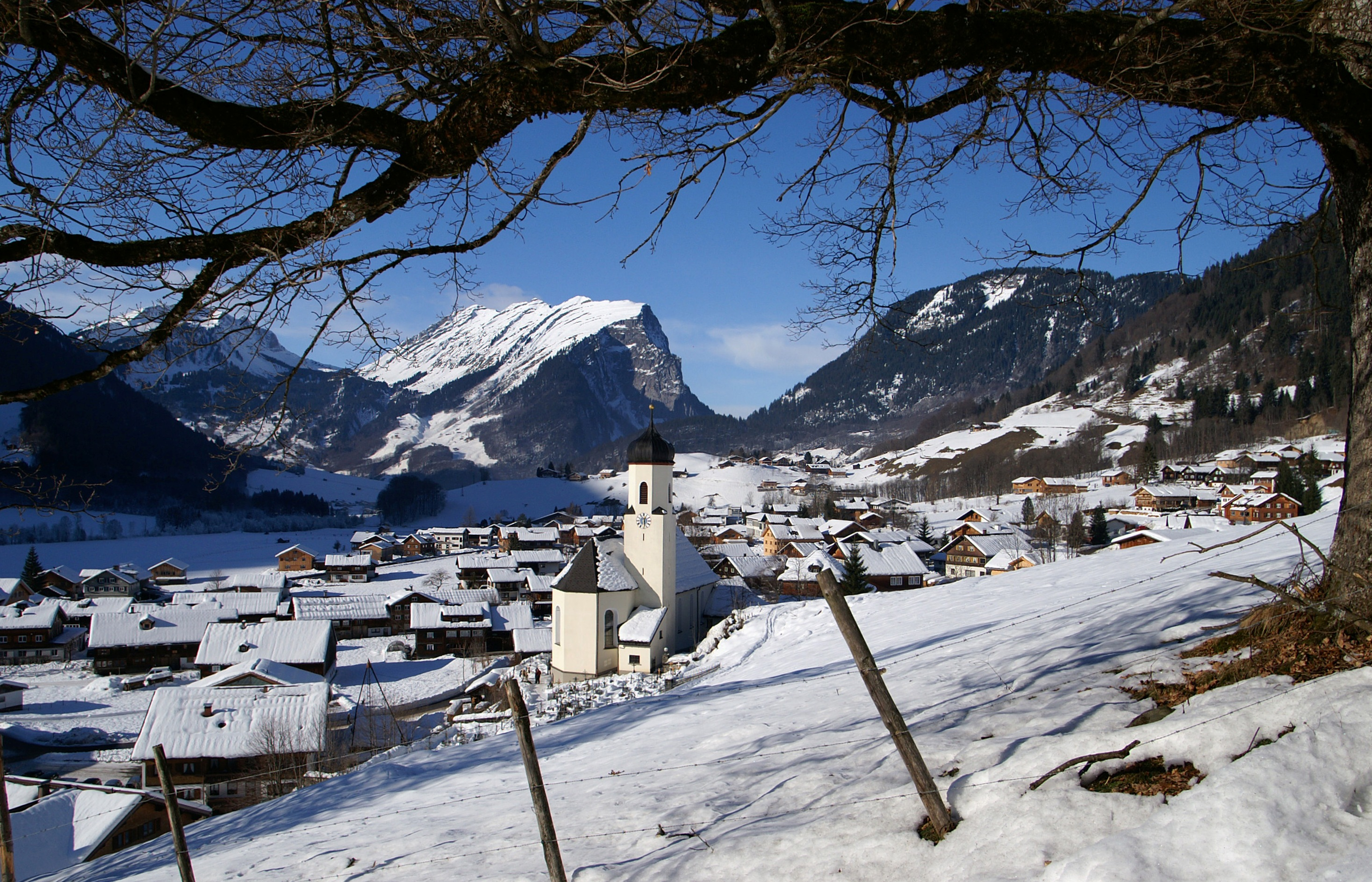 Vor der Kanisfluh das Gemeindegebiet von Schoppernau im Bregenzerwald mit der Pfarrkirche Hll. Philippus und Jakobus.